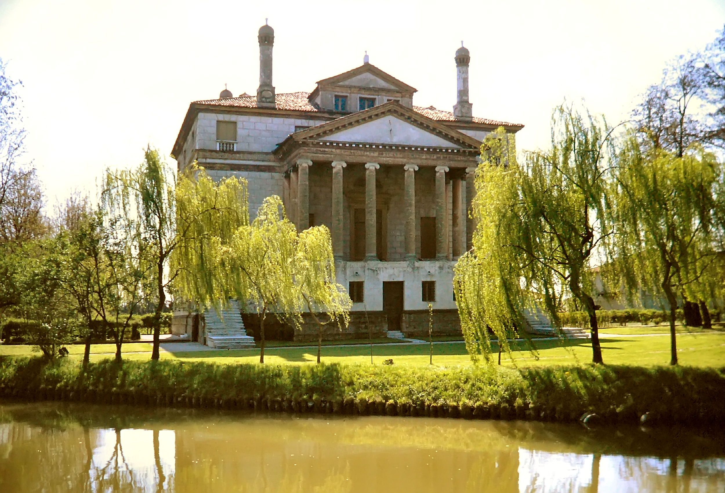 Villa Foscari (Malcontenta) bei Mira (VE) von der Wasserseite